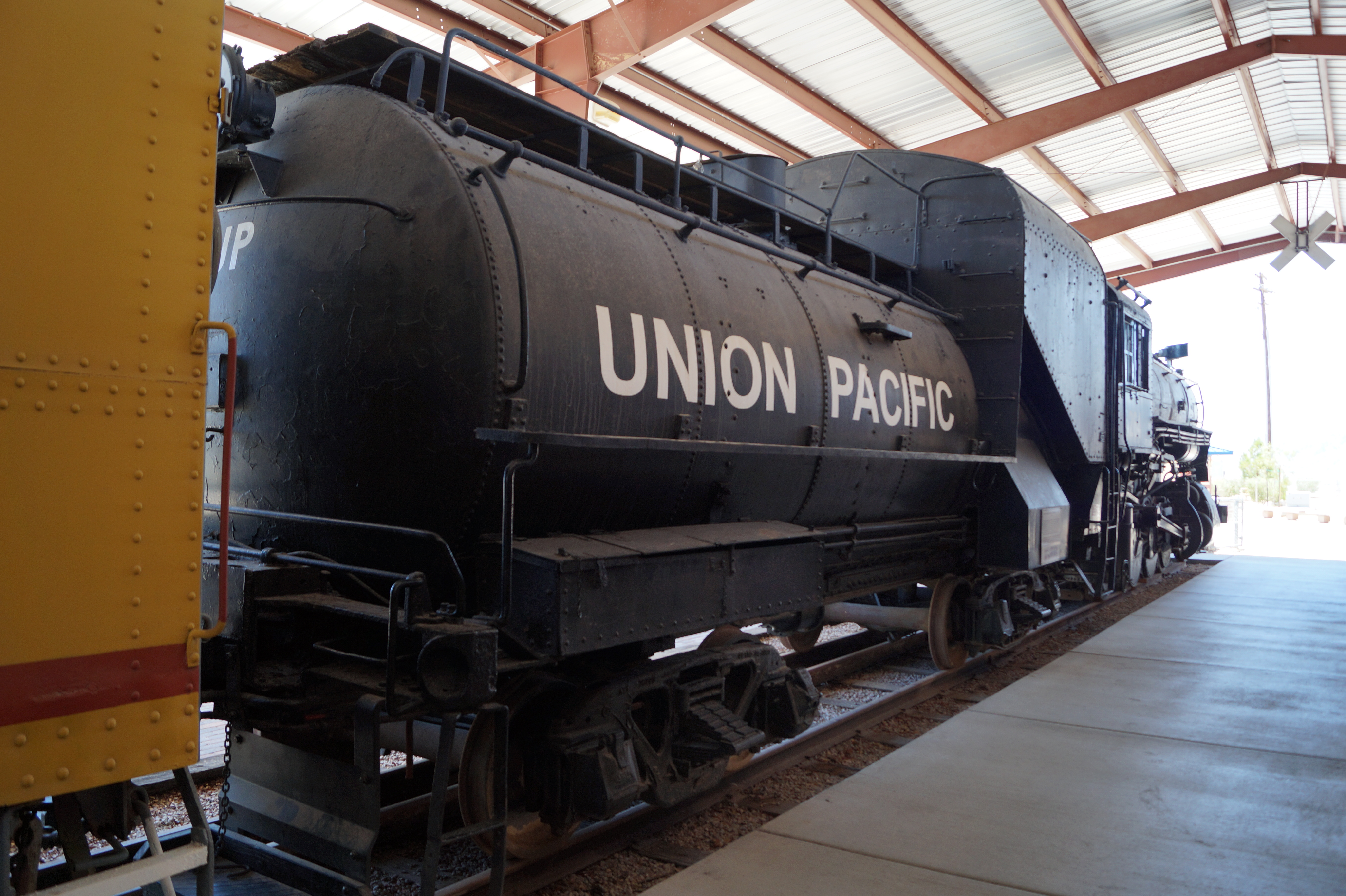 The Nevada State Railroad Museum which is an agency of the Nevada Department of Cultural Affairs, is located at Yucca Street on the tracks of the historic Union Pacific Railroad branch Henderson-Boulder City near the former Boulder City Railroad Yards where the Hoover Dam construction equipment was unloaded in the 1930s.